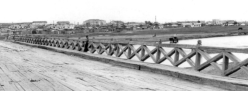 The bridge on the Kherülen river at the Choybalsan (in 1972). Мост на реке Херлен у г. Чойбалсан (1972 г.)